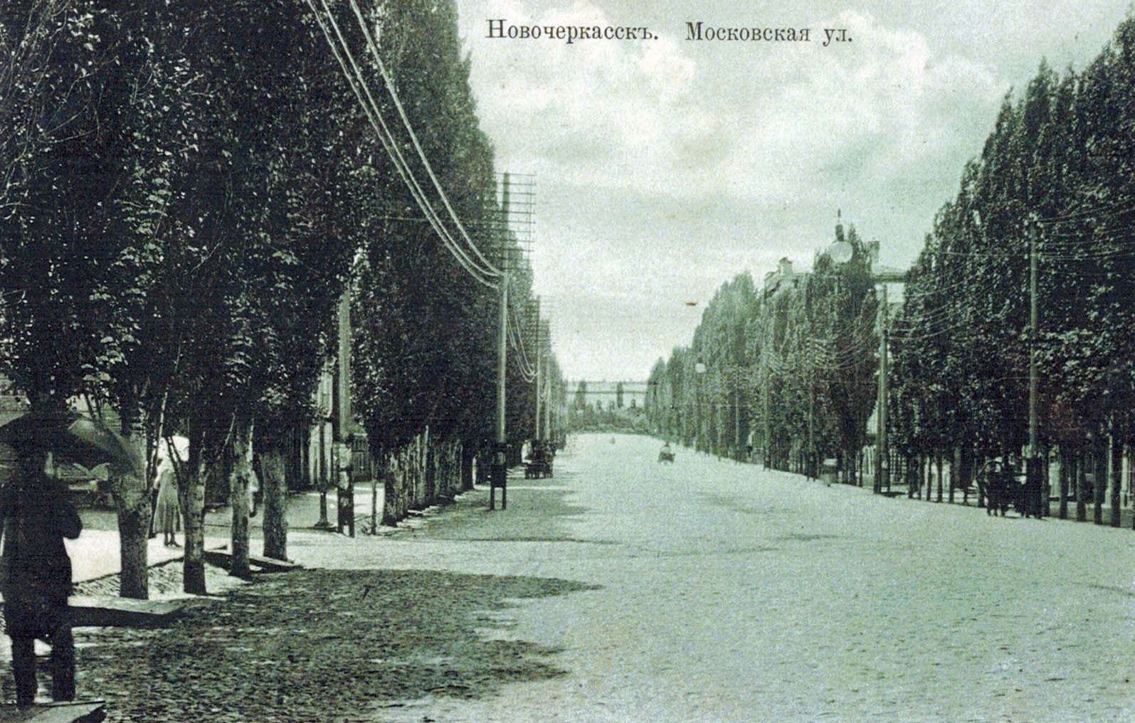 Московская улица в городе Новочеркасск